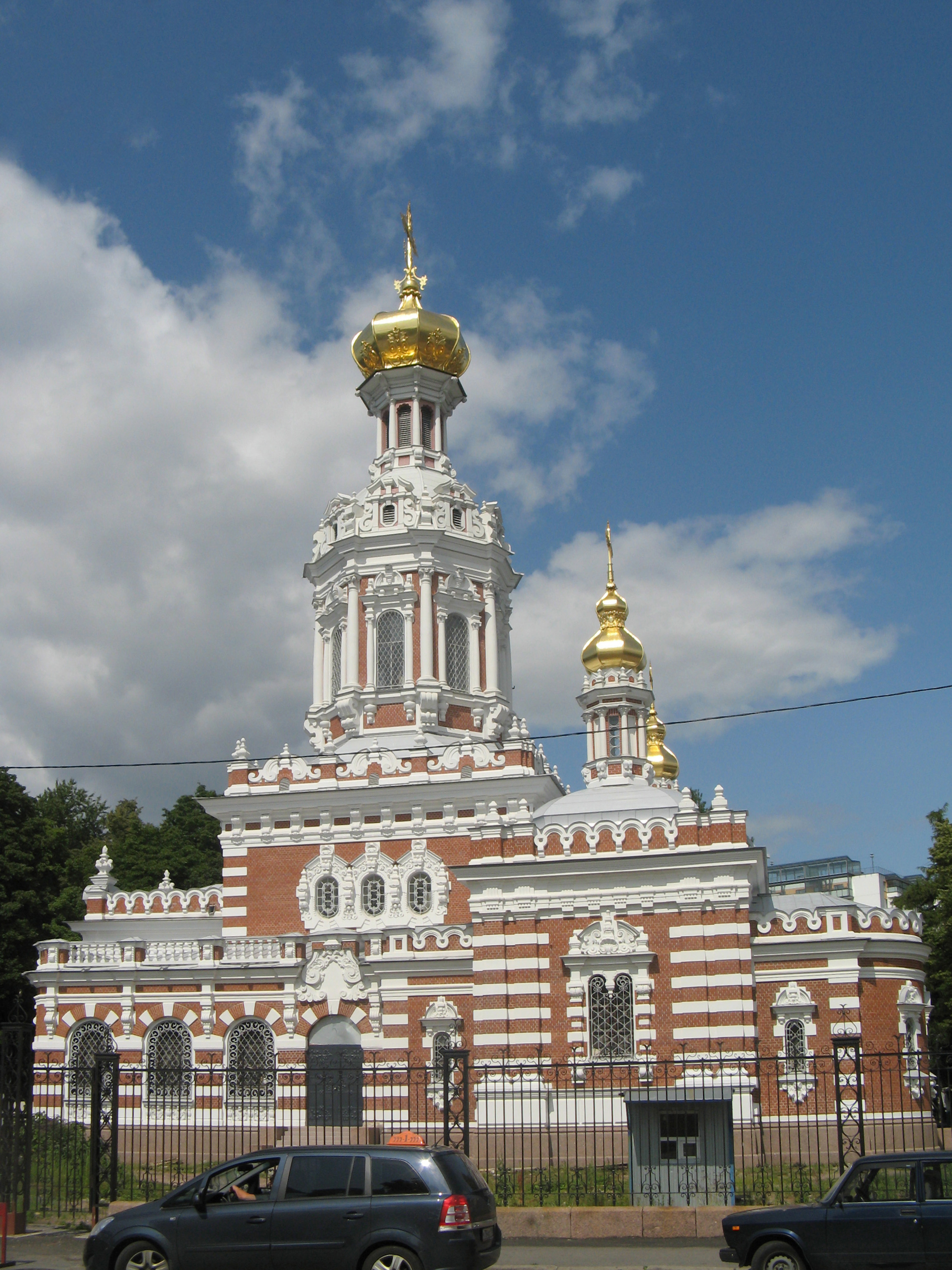 Церковь Воскресения Христова: улица Камская, 11, Васильевский, Василеостровский район, Санкт-Петербург